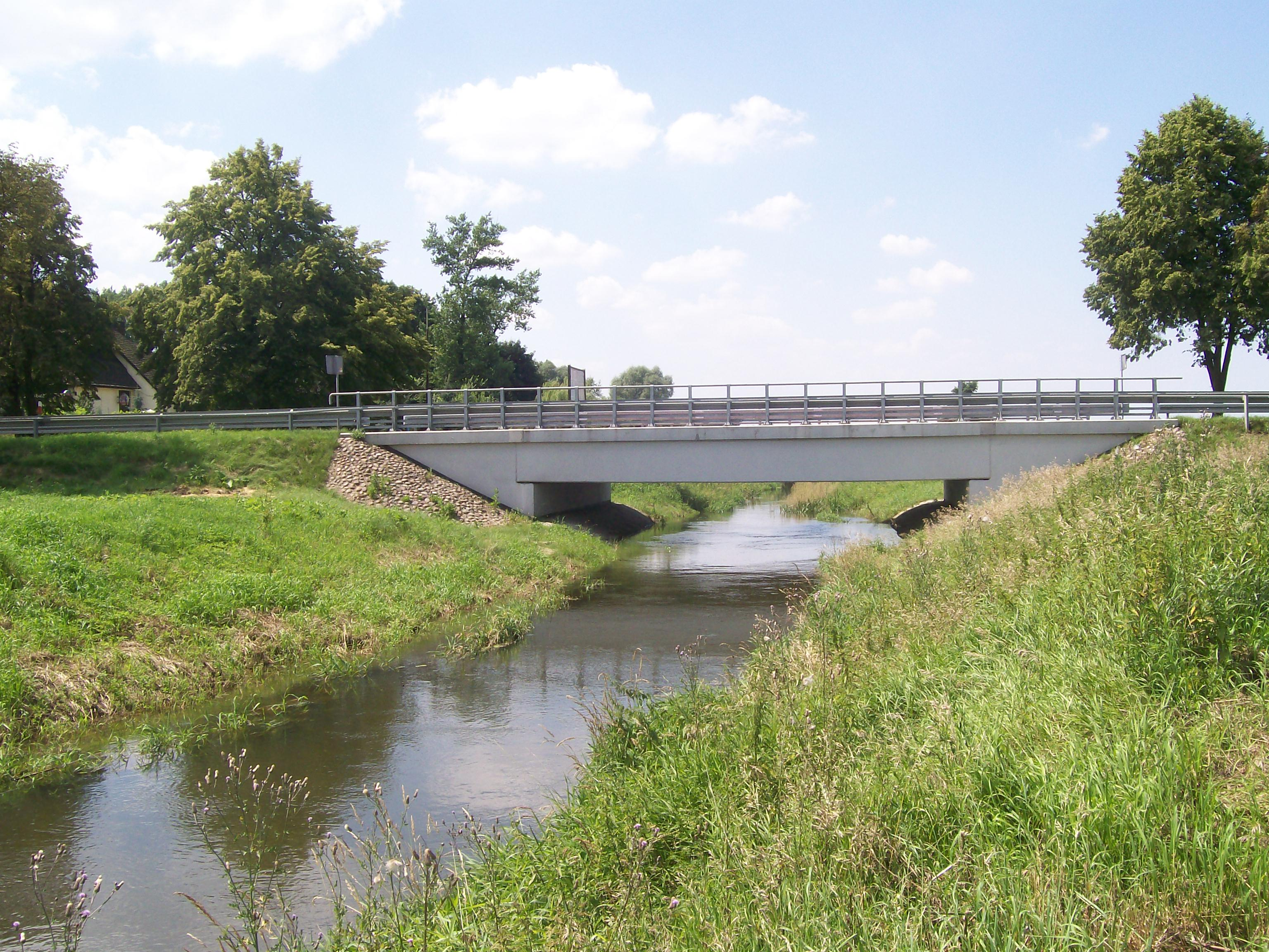 Most nad Pyszną w ciągu Drogi Krajowej nr 45 - na granicy miasta Wielunia i gminy Czarnożyły